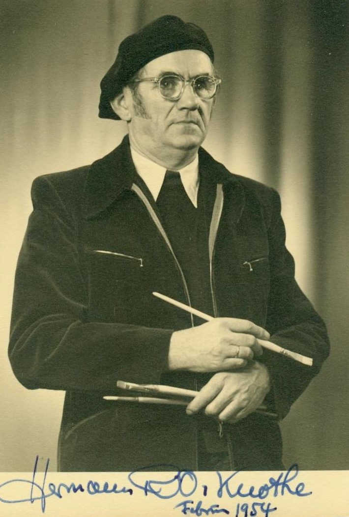 Autogrammfoto mit Originalunterschrift Bad Elster